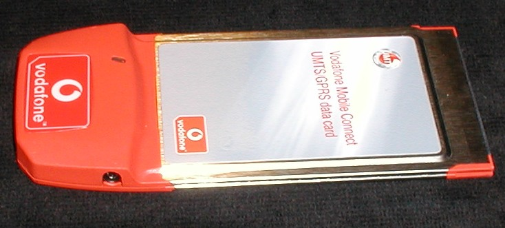 Mobile Connect UMTS/GPRS data card von Vodafone